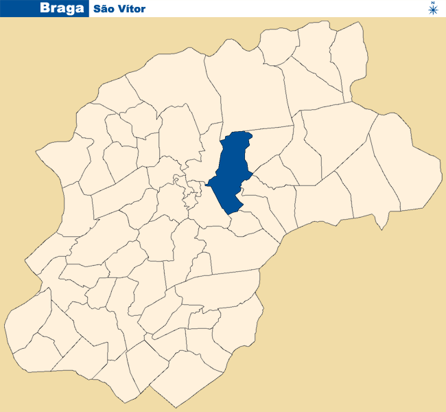 Localização de São Vítor no concelho de Braga.